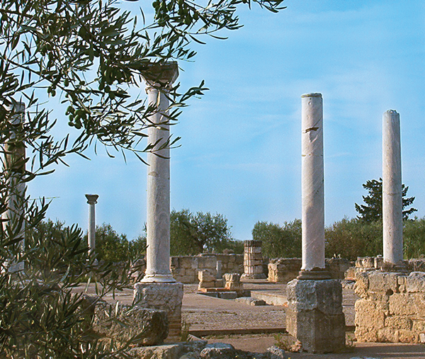 Italic Temple - Canosa di Puglia